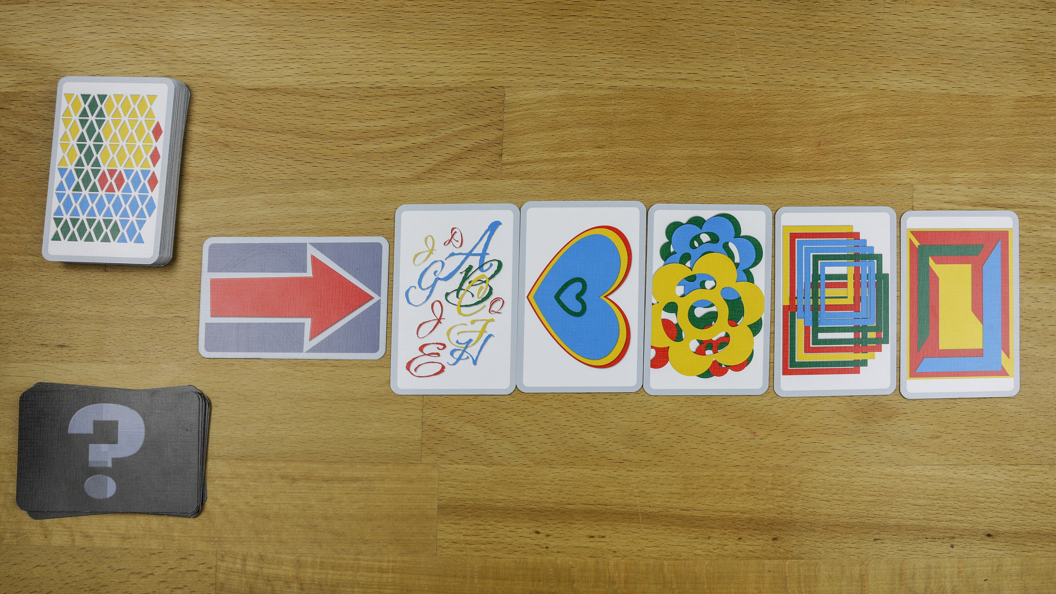 Spielsituation im Kartenspiel "Illusion" mit einer fehlerfreien Reihe von Karten im Sinne der Spielregeln